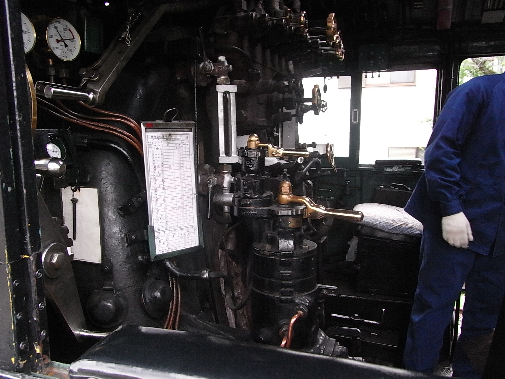 国鉄C58形蒸気機関車